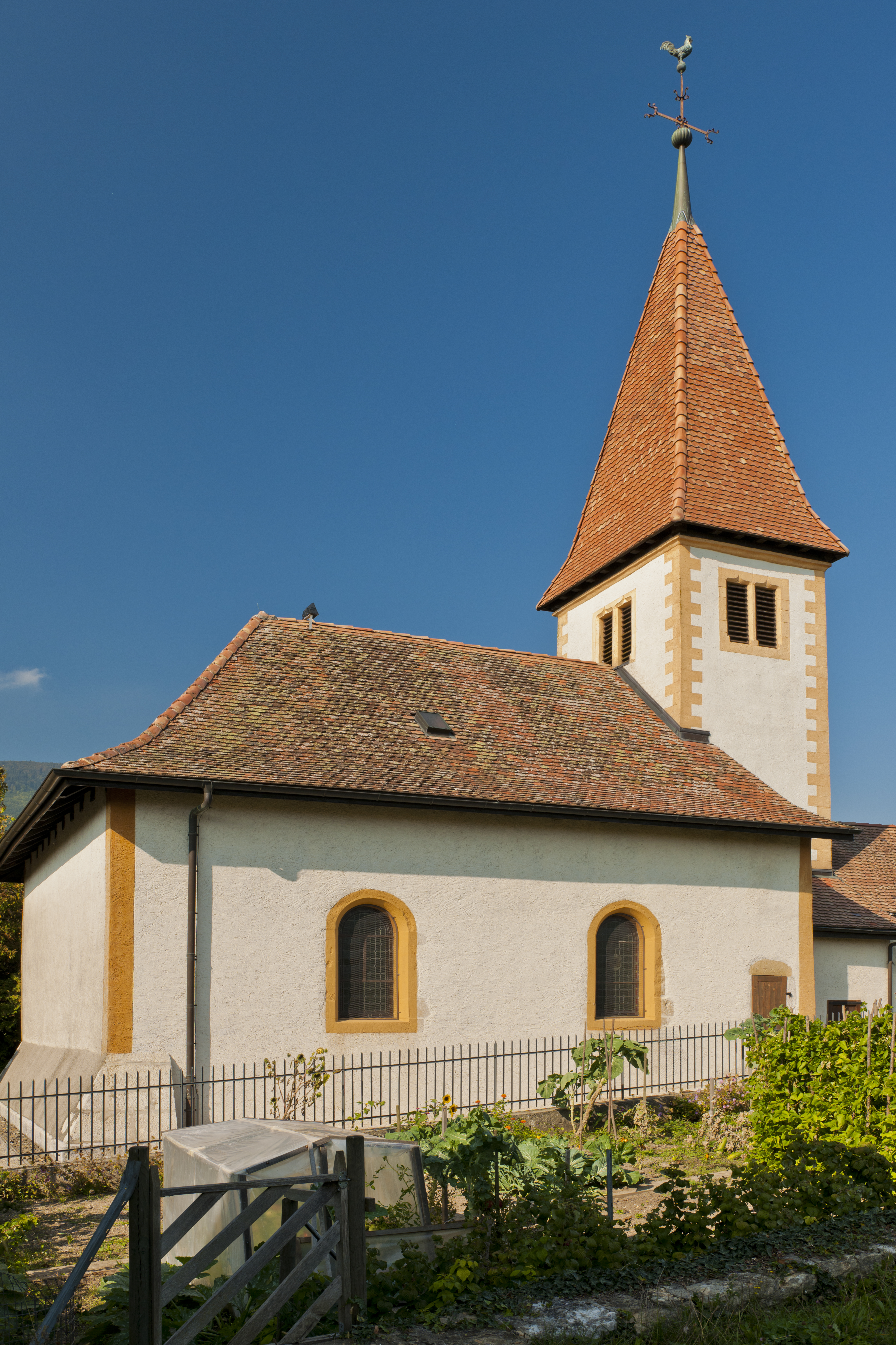 Onnens, Eglise réformée St-Martin